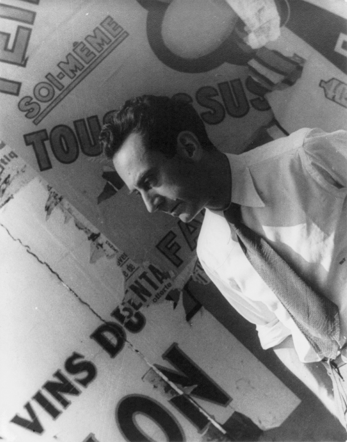 Man Ray in Paris